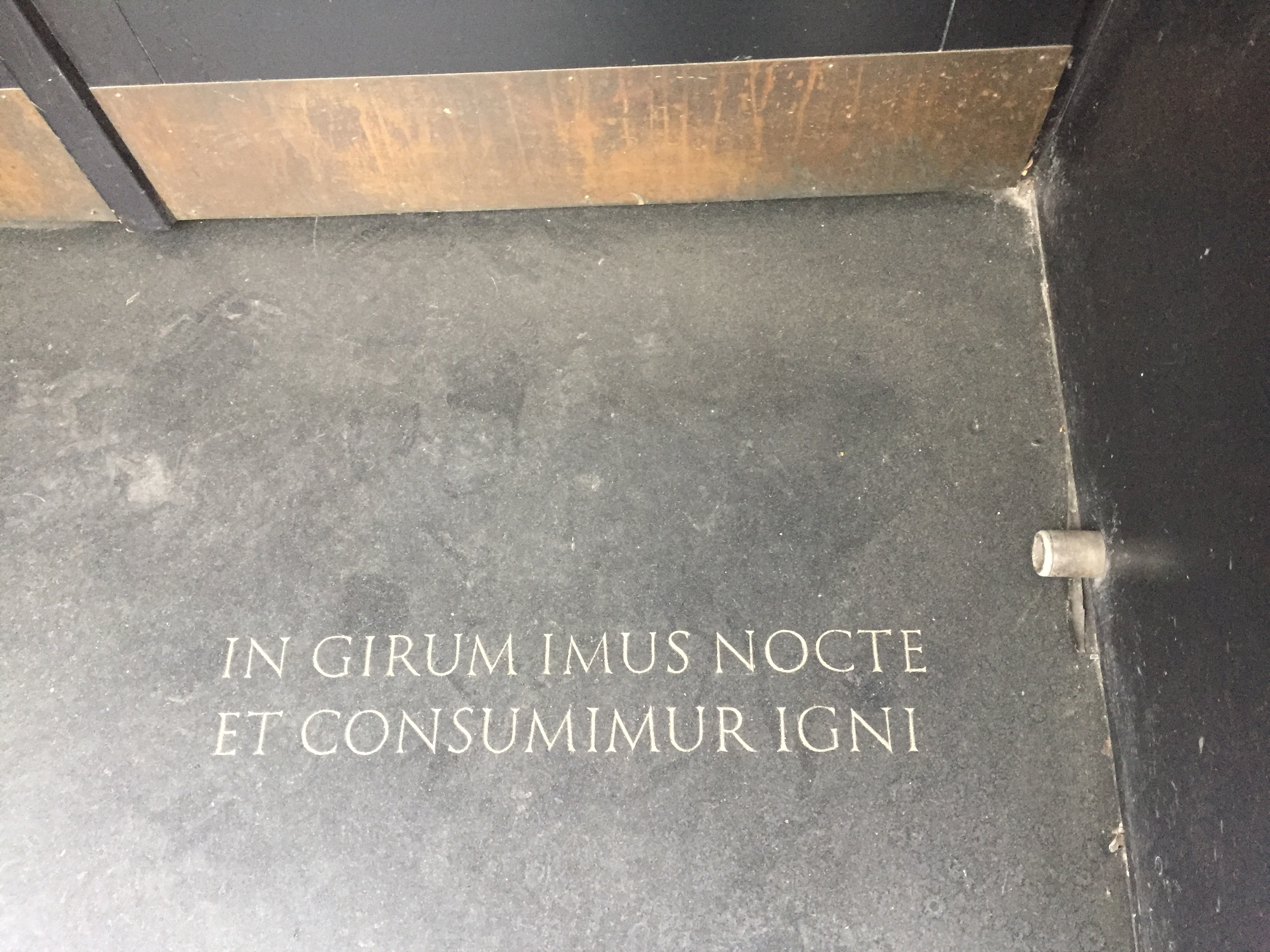 Lateinisches Palindrom auf einer Türschwelle in Berlin, Charlottenburg.